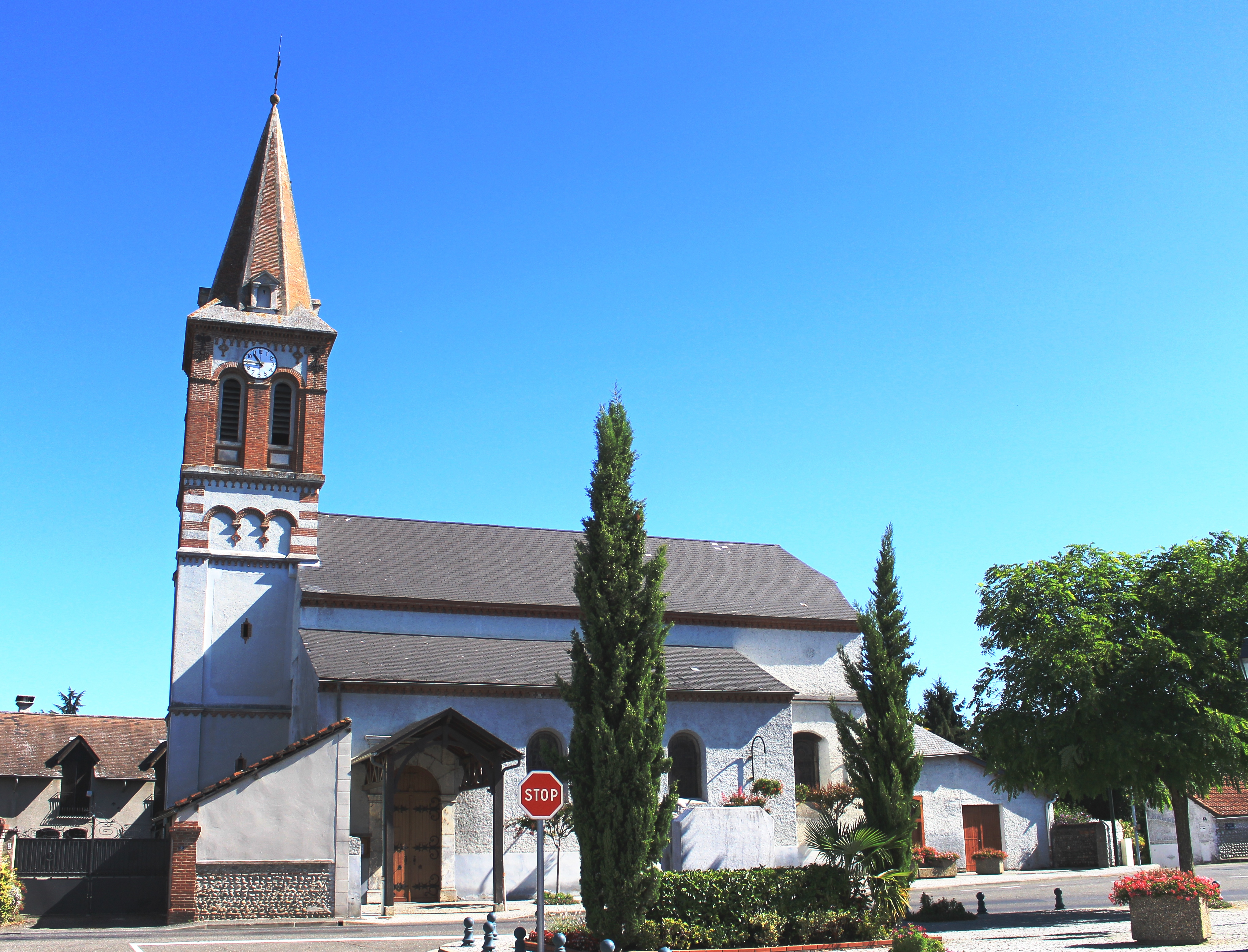 Église Saint-Martin de Bazet (Hautes-Pyrénées)